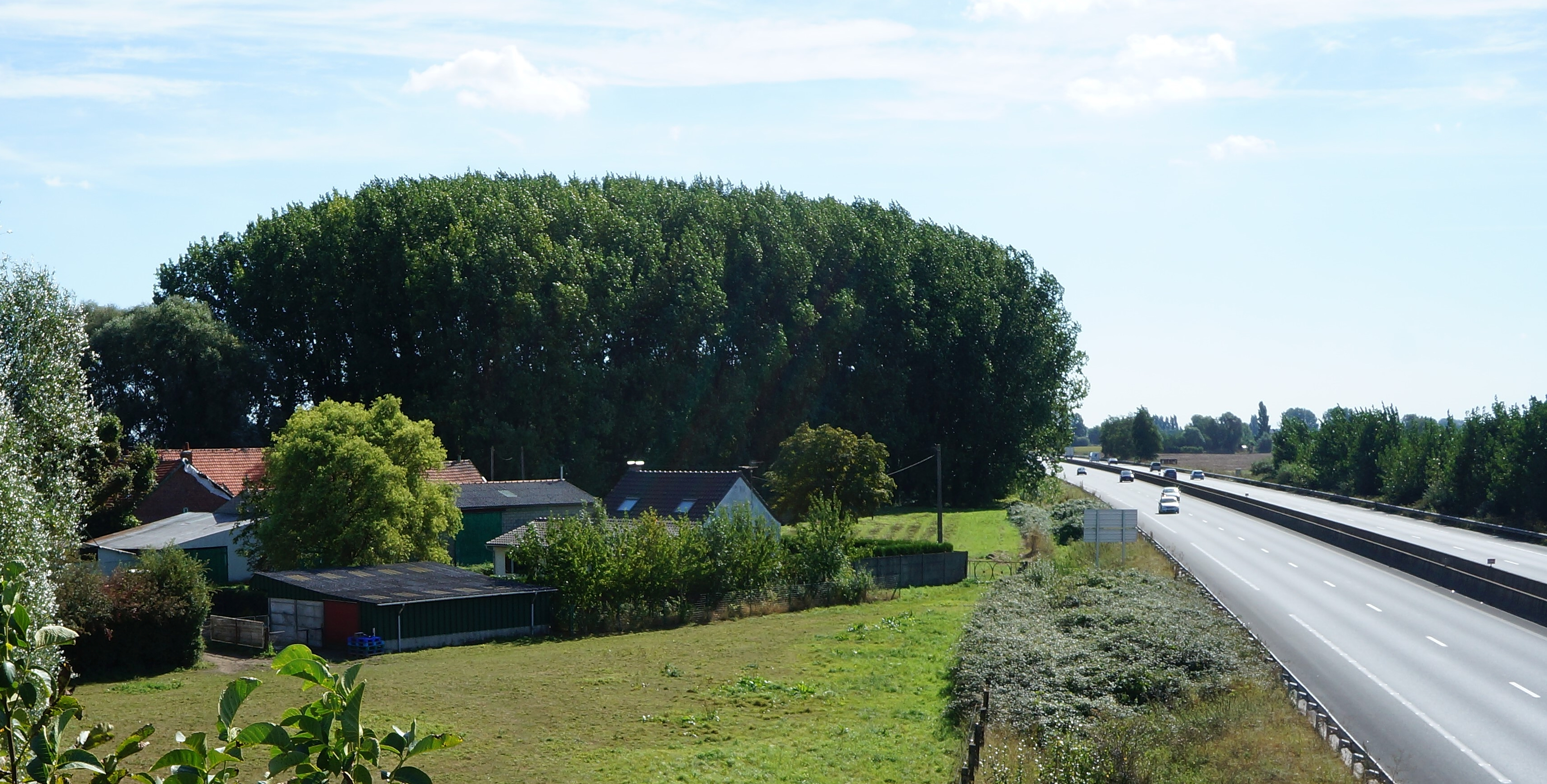 La ferme d'Arthur Vanabelle après rénovation, à Steenwerck Nord.- France.